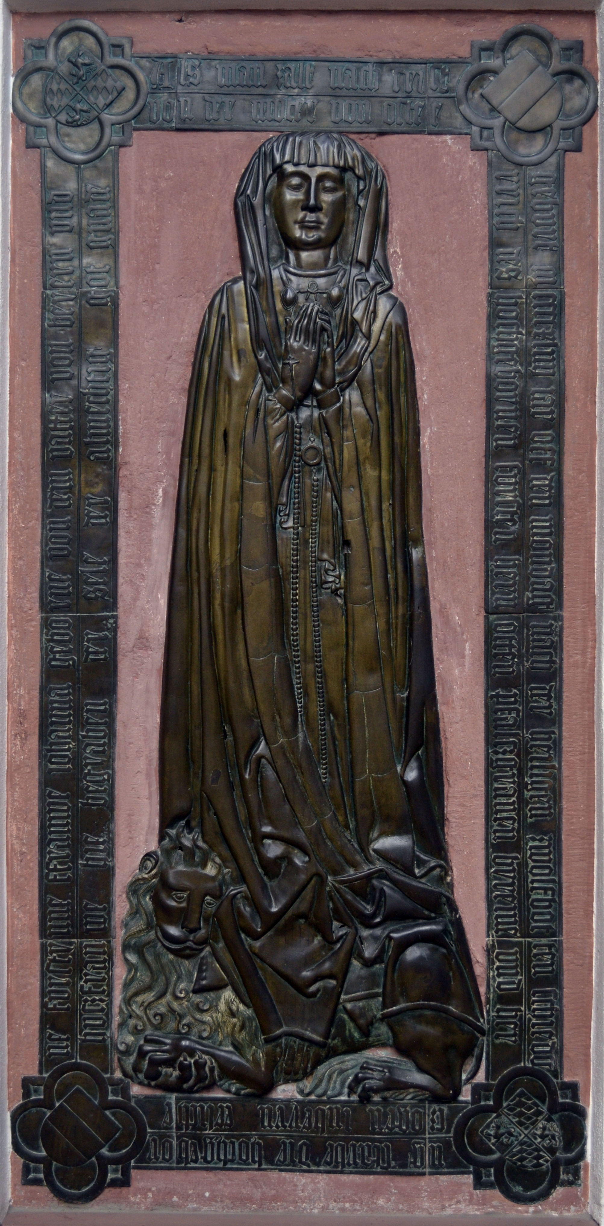 Epitaph der Pfalzgräfin Johanna von Bayern (1413-1444) in der Stiftskirche St. Juliana zu Mosbach; Tochter Heinrich XVI. (Bayern) und der Margarethe von Österreich; daher Wappen Bayern und Österreich (Bindenschild)